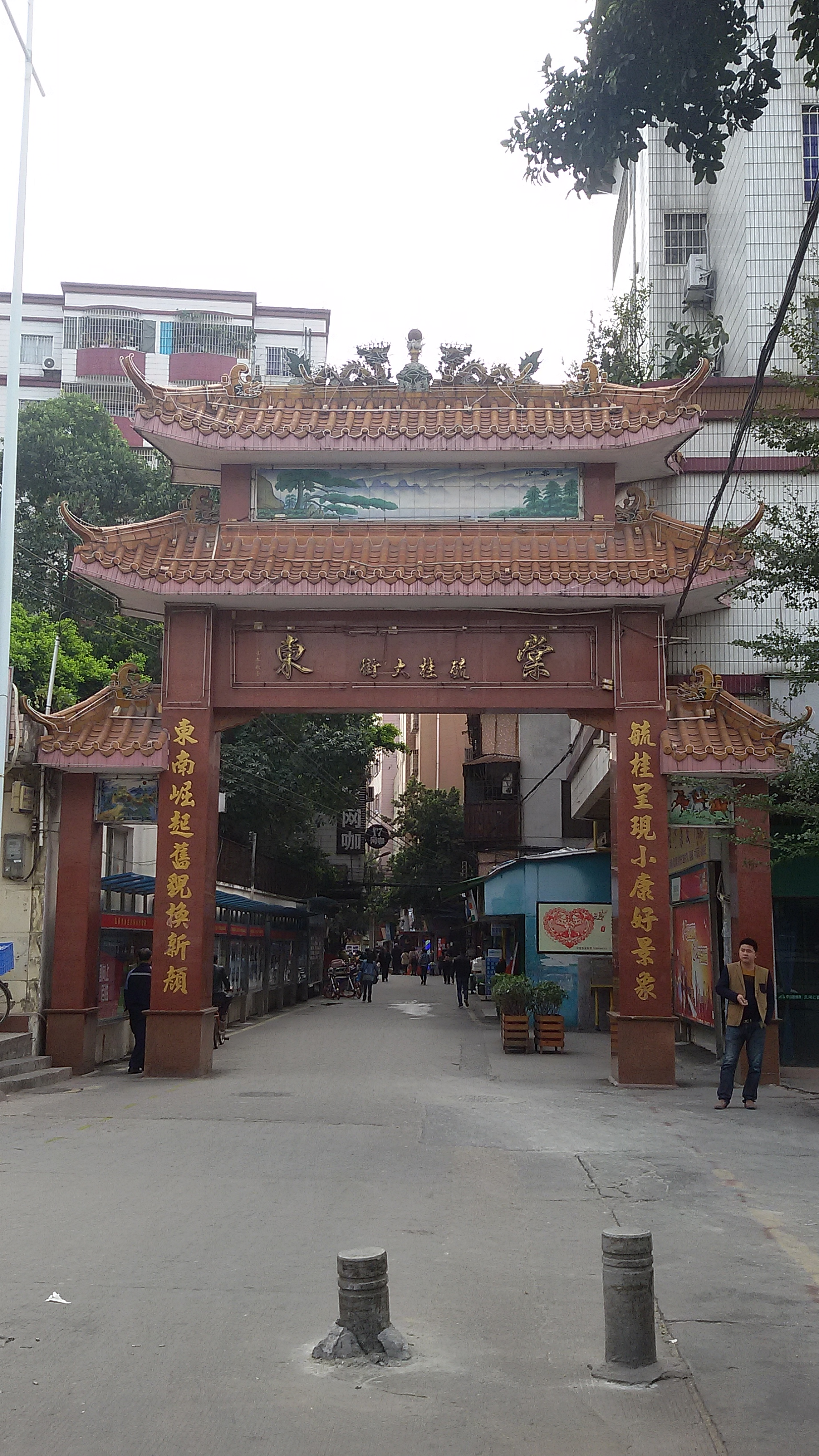 粵語: 天河區棠東社區牌坊